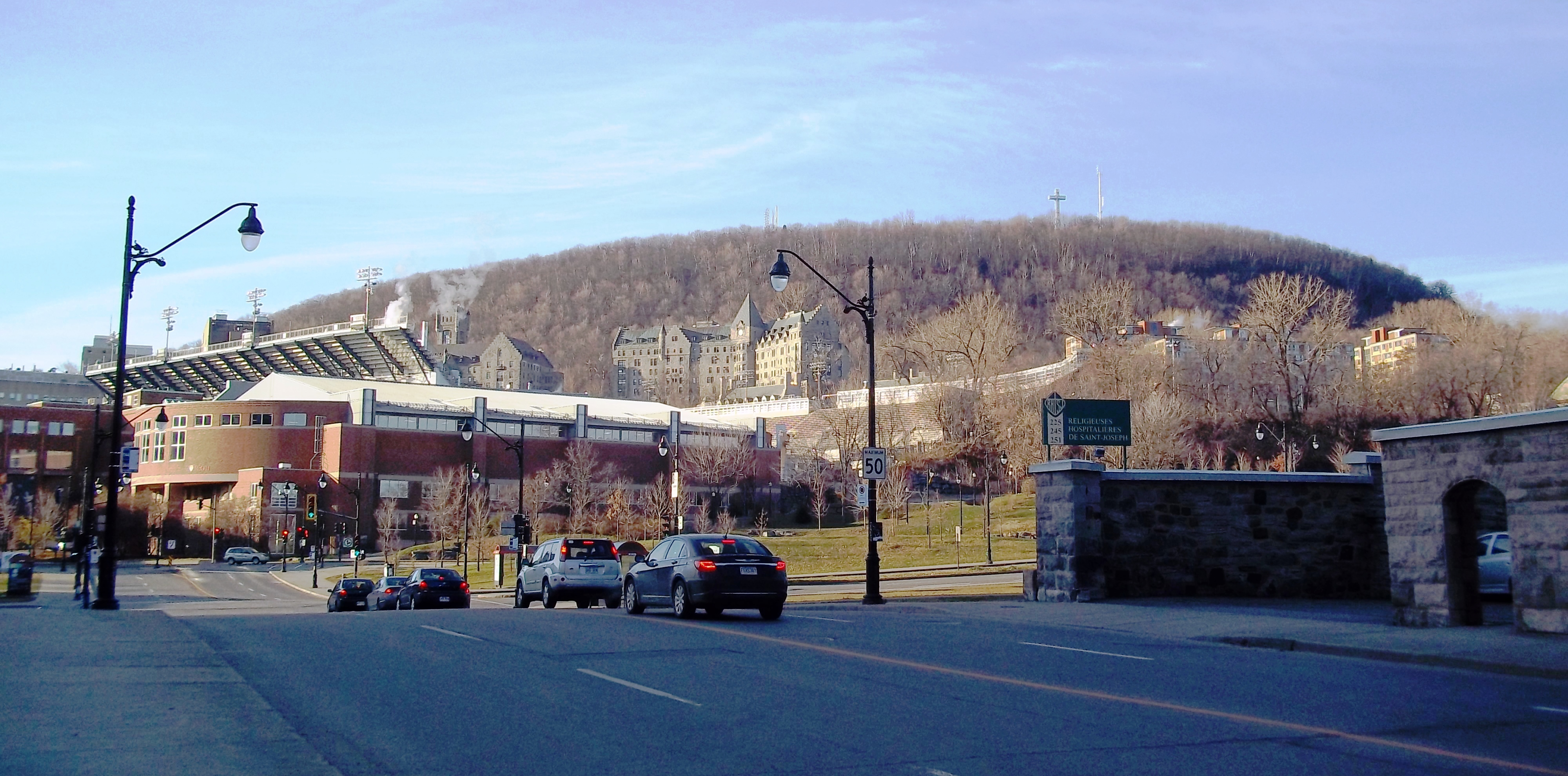 Le mont Royal vu de l'avenue des Pins, à l'est de l'avenue du Parc, près de l'Hôtel-Dieu de Montréal